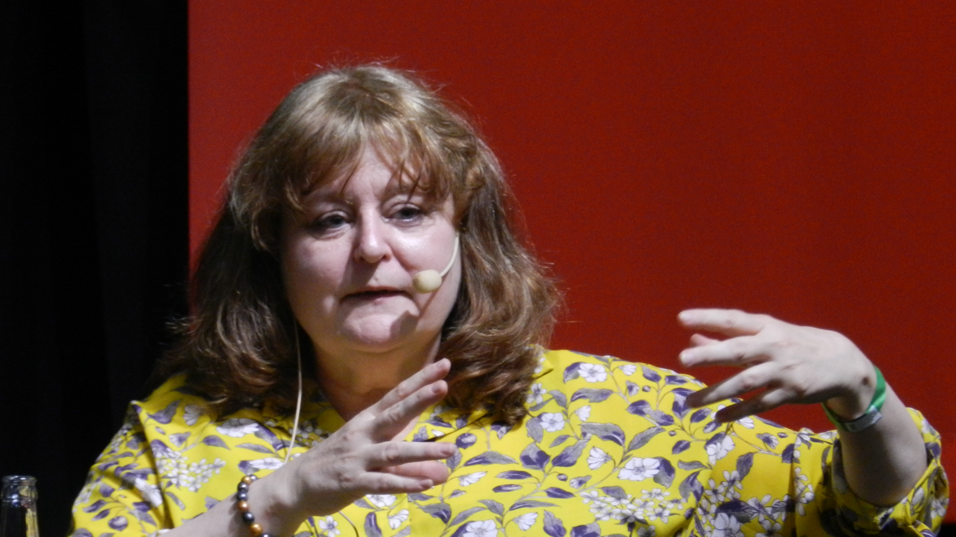 Jo Salmson på Bokmässan i Göteborg 2017.